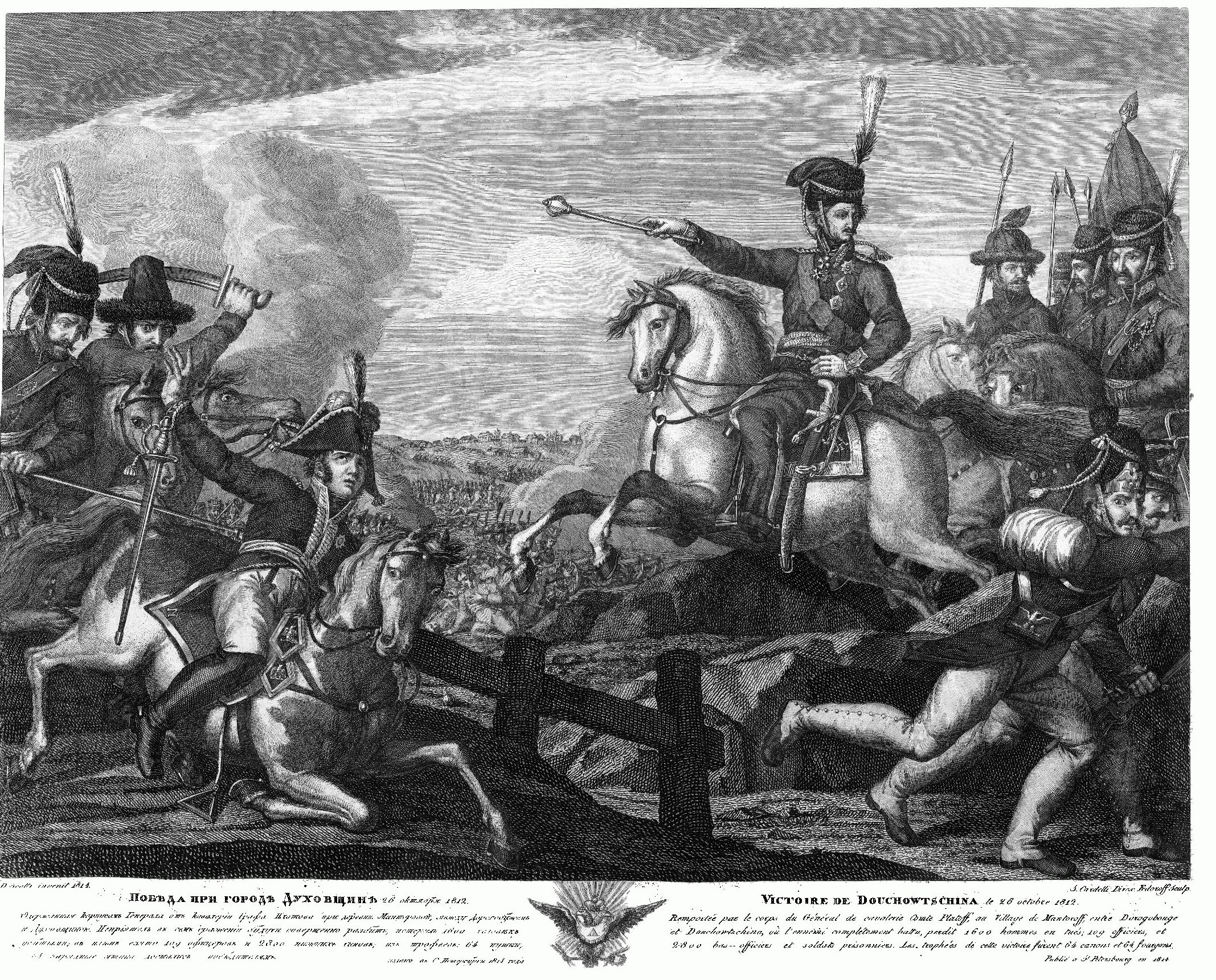 Победа при городе Духовщине 26 окт. 1812